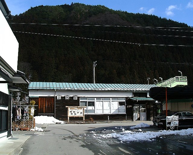 高山本線上呂駅 駅舎